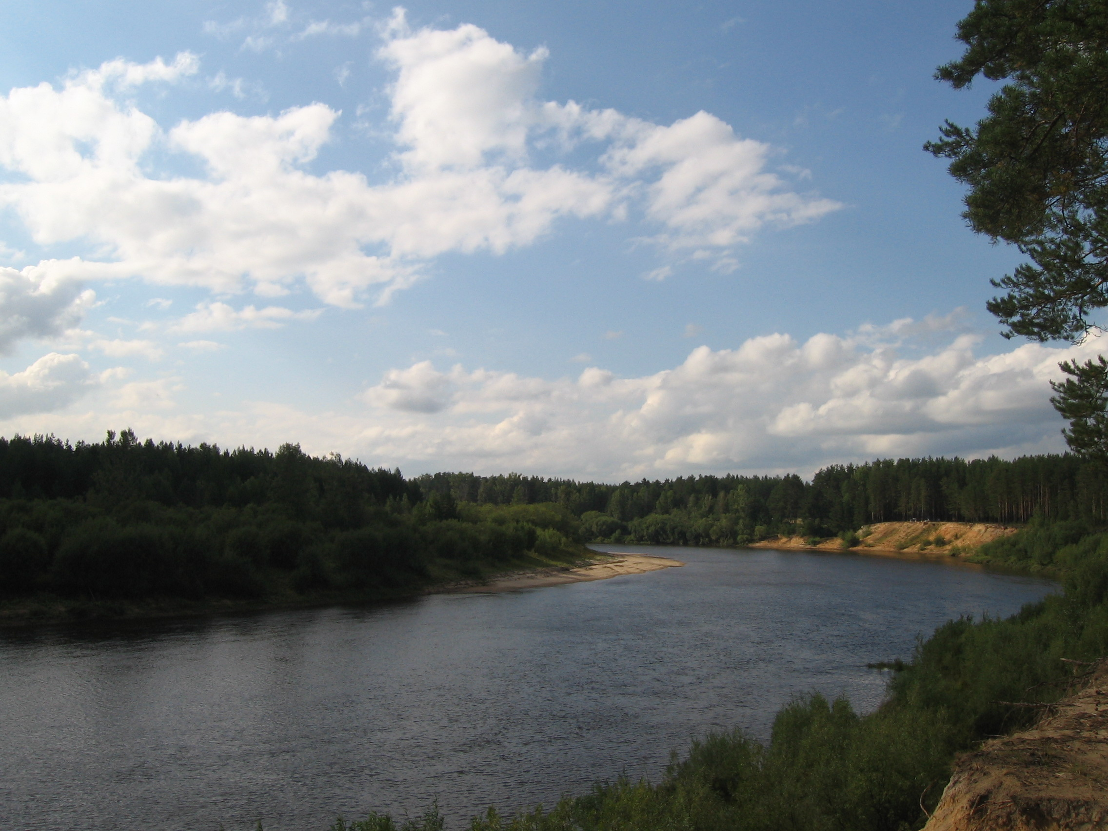 река Ветлуга ( Шарья )